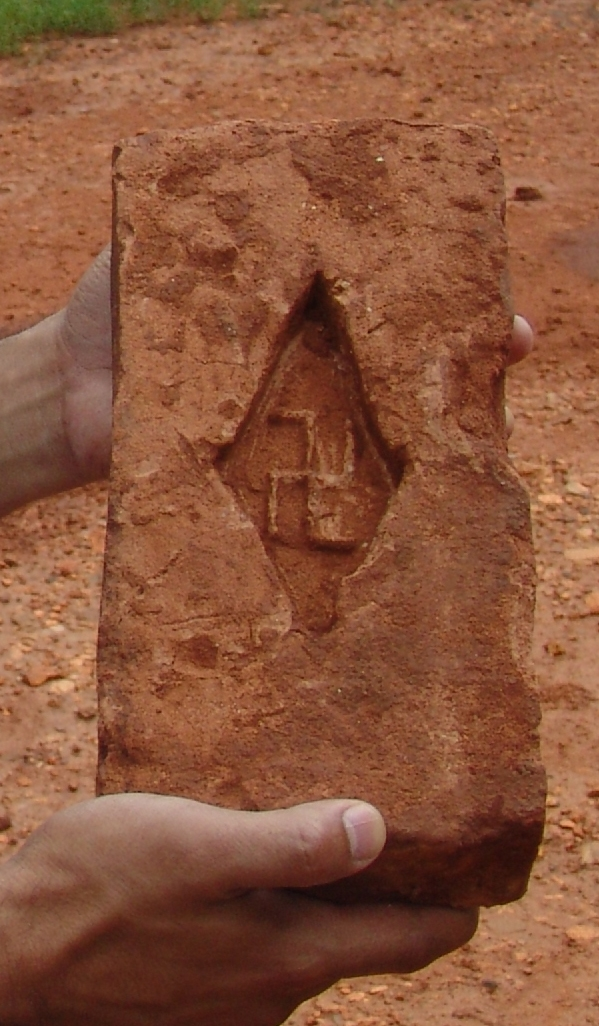 Foto do município de Campina do Monte Alegre, São Paulo, Brasil